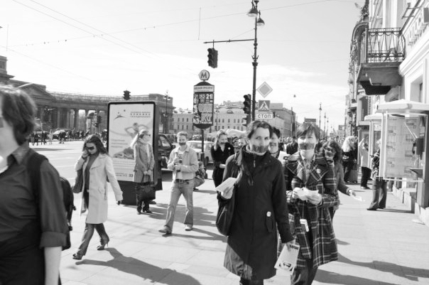 День молчания в далеком 2009 году